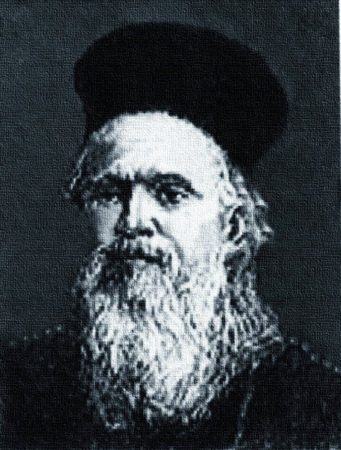 Metropolit Sylvester Morariu-Andriewicz, eigentlich Samuil Morariu, Theologe, Politiker und Schriftsteller, vor 1895